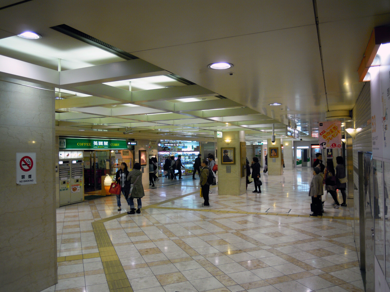 Nanba Walk